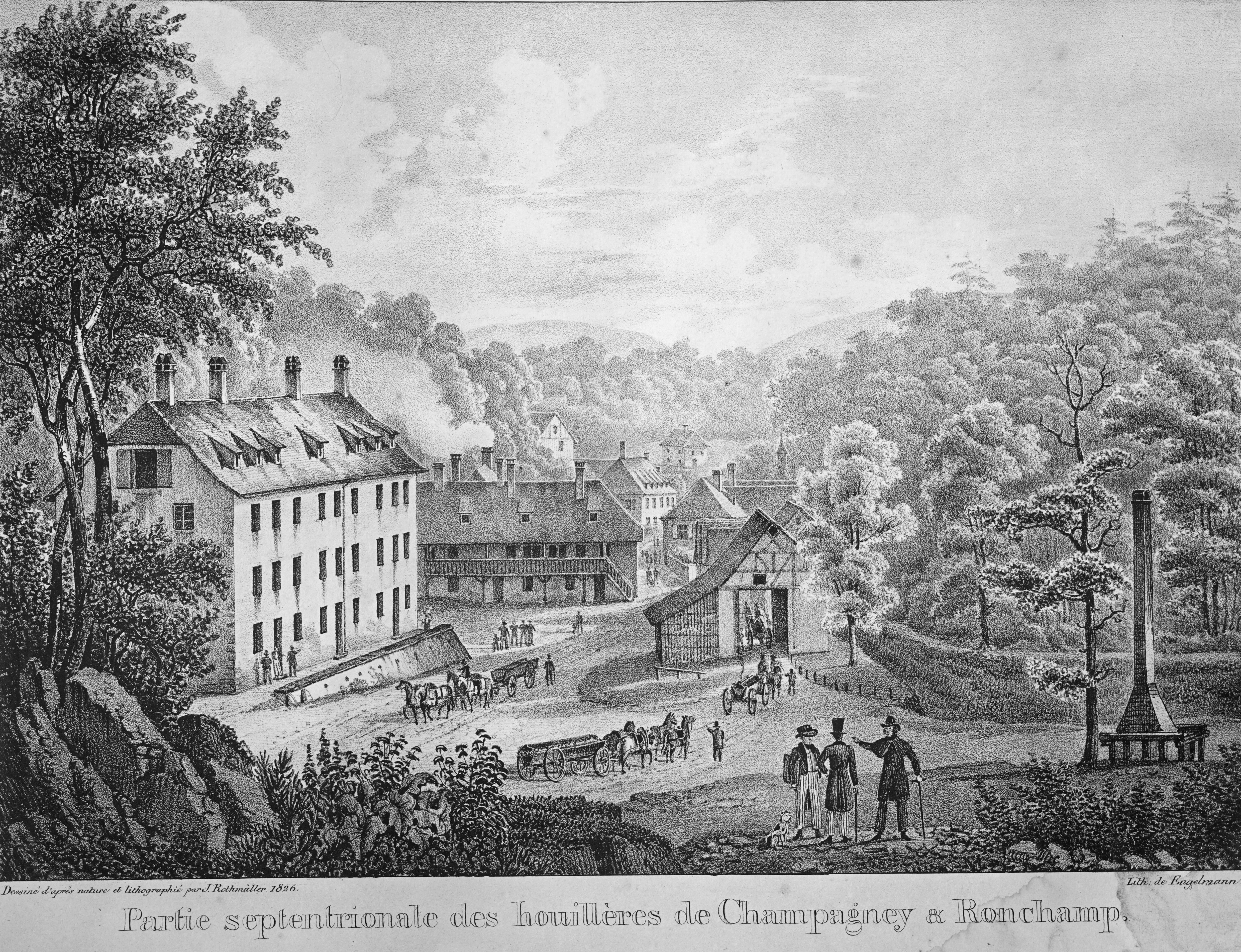 Les logements du hameau de la houillère en 1826, le bâtiment de gauche a été démoli en 1992.